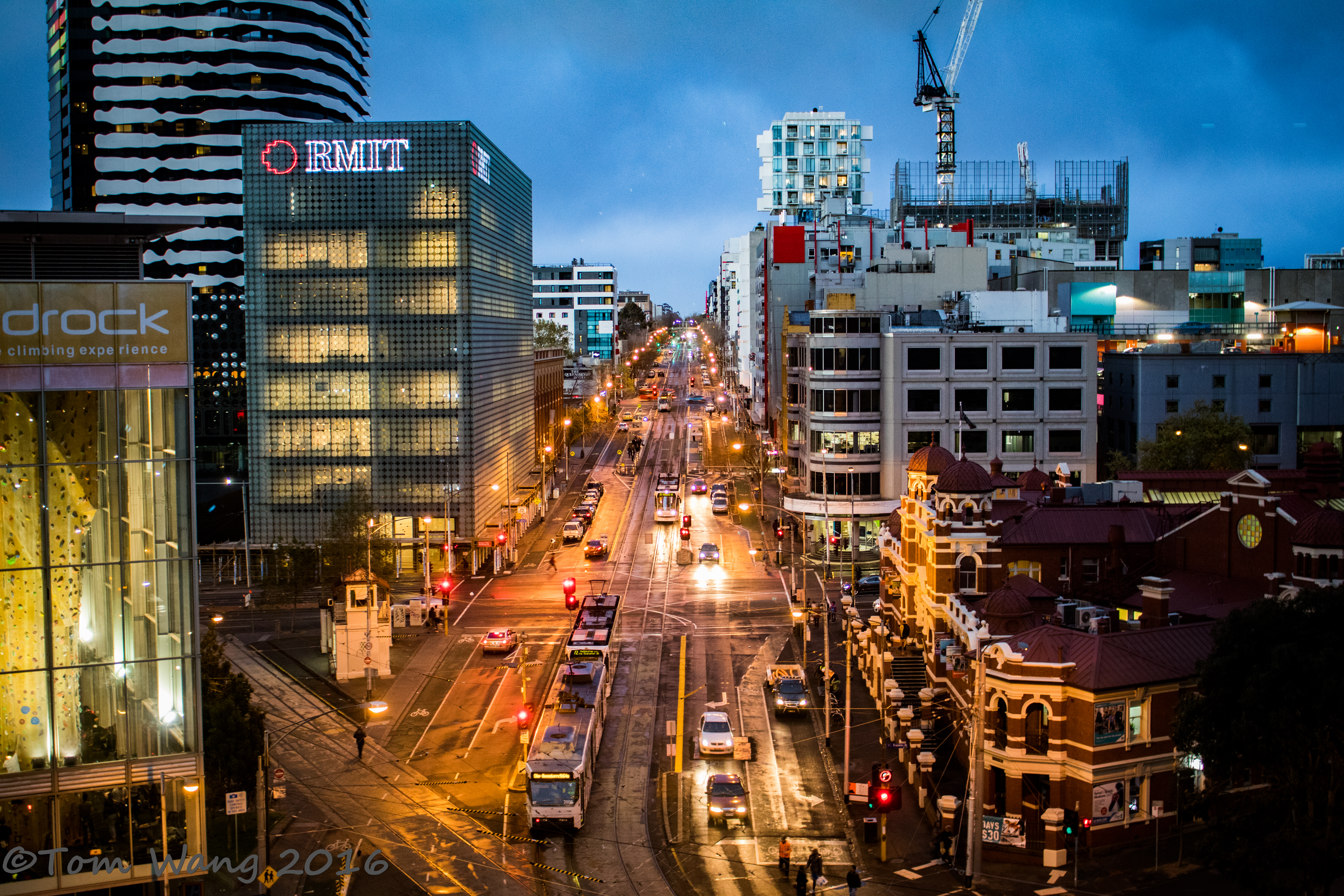 中文（中国大陆）: 从高处眺望墨尔本市中心